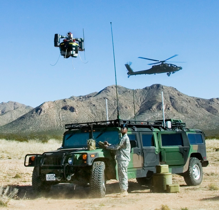 class 1 uav